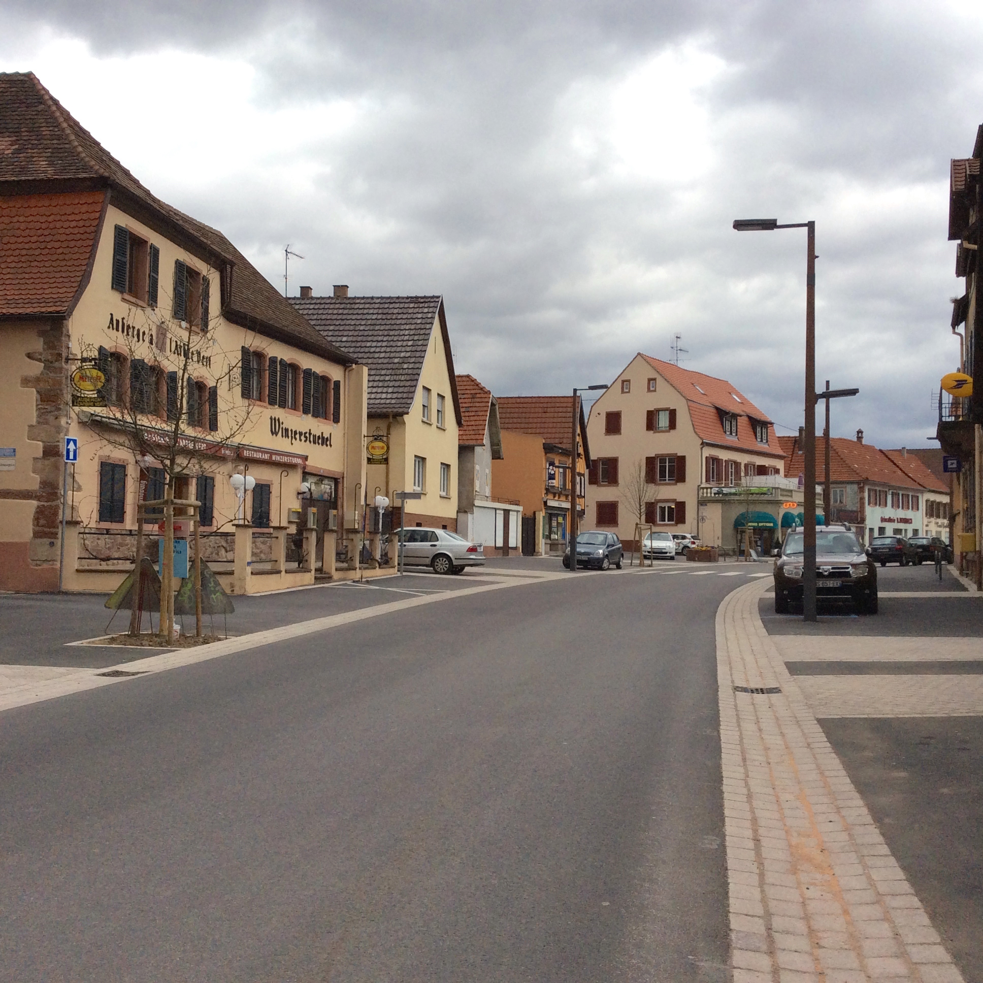 Prise de vue Rue du Général de Gaulle à Marlenheim la rue principale de Marlenheim.